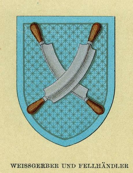 Wappen der Weißgerber und Fellhändler (Wappen der Wiener Gewerbegenossenschaften, um 1900)